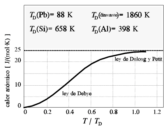 Calor específico de solidos. Ley de Dulong y Petit, Ley de Debye